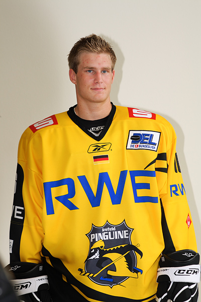 Daniel Pietta im Dress der Krefeld Pinguine 2008/2009